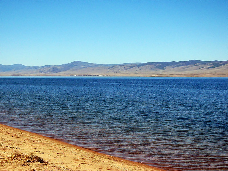 Гусиное озеро. Хамбинский хребет.